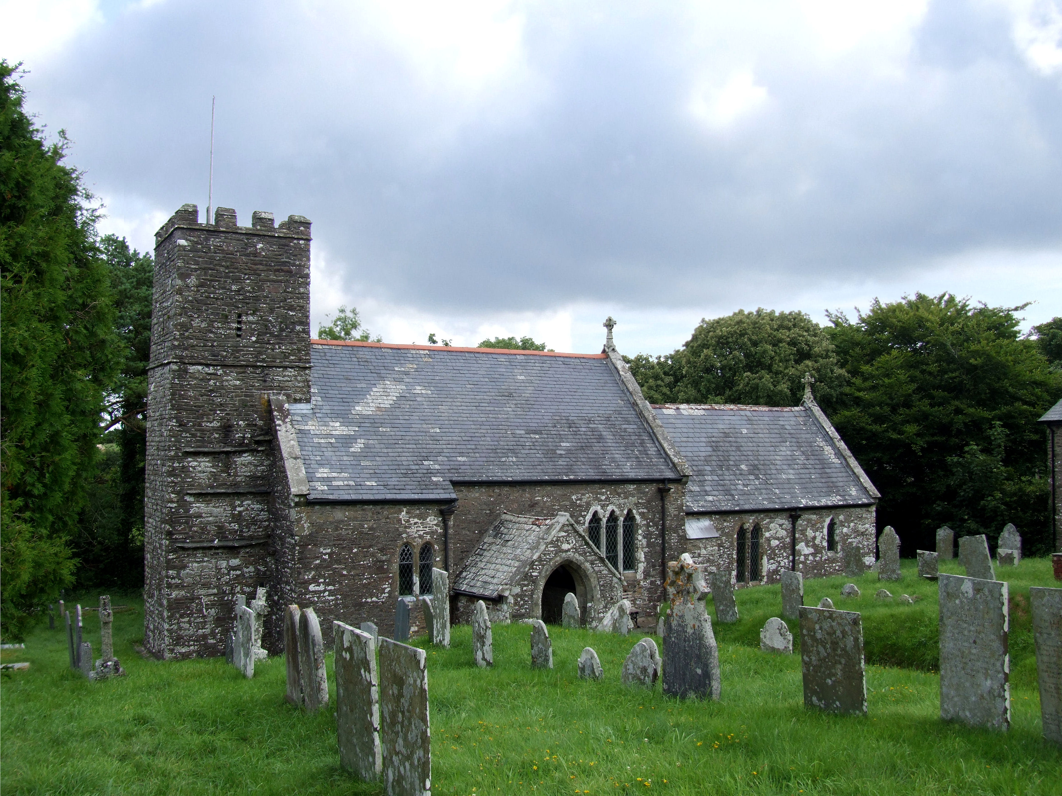 St Martin's Church, Martinhoe, Devon